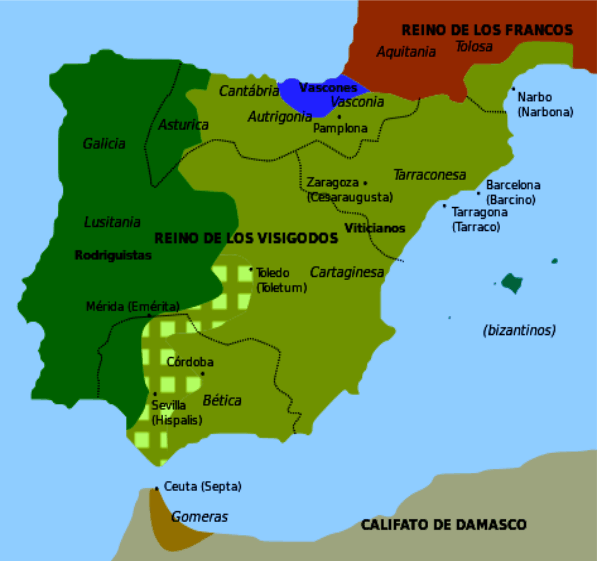 Vizigotsko kraljestvo v času muslimanske invazije.